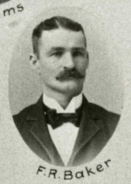 Rep F.R. Baker